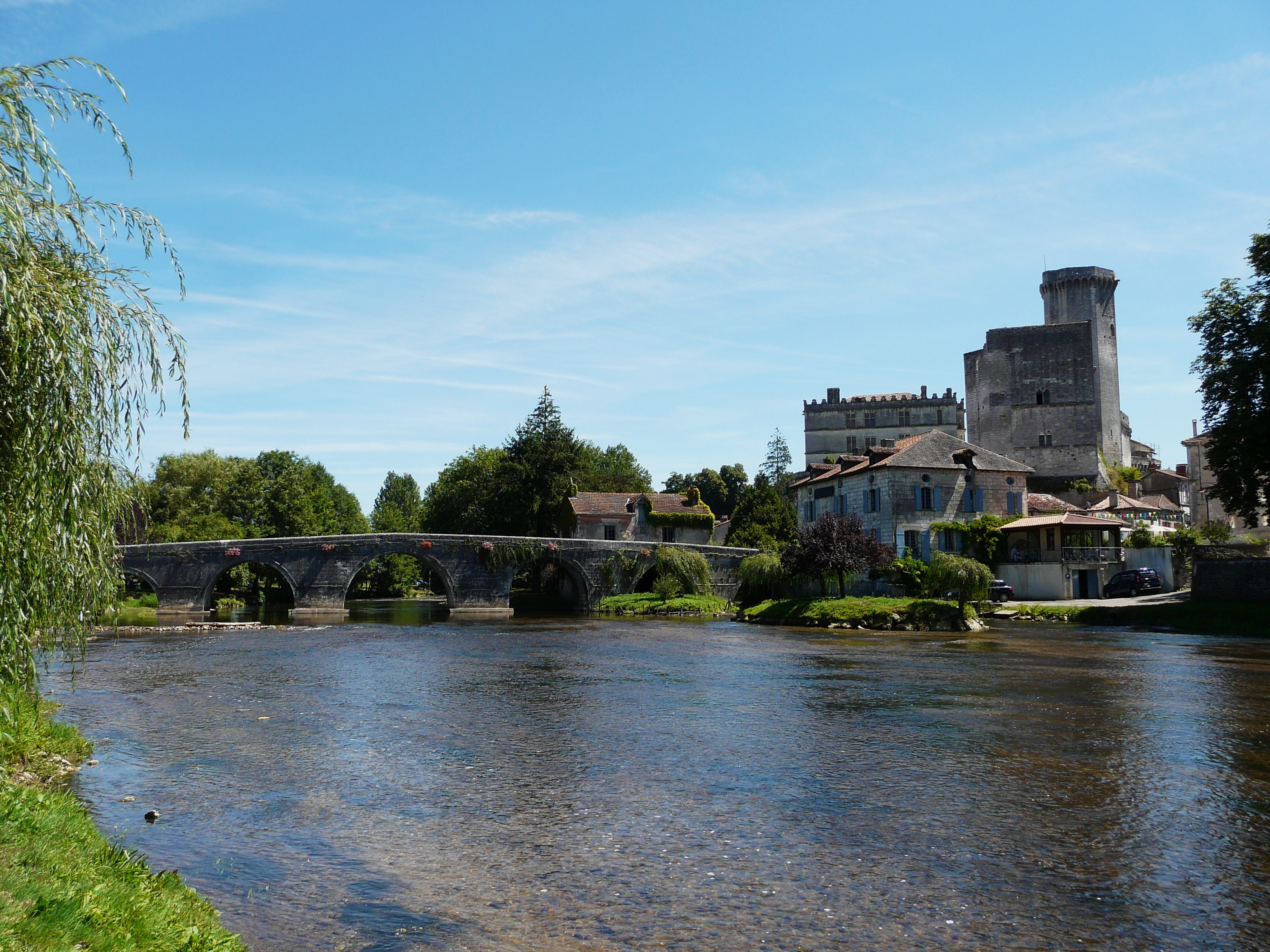 Le vieux pont sur la Dronne, Bourdeilles, Dordogne, France